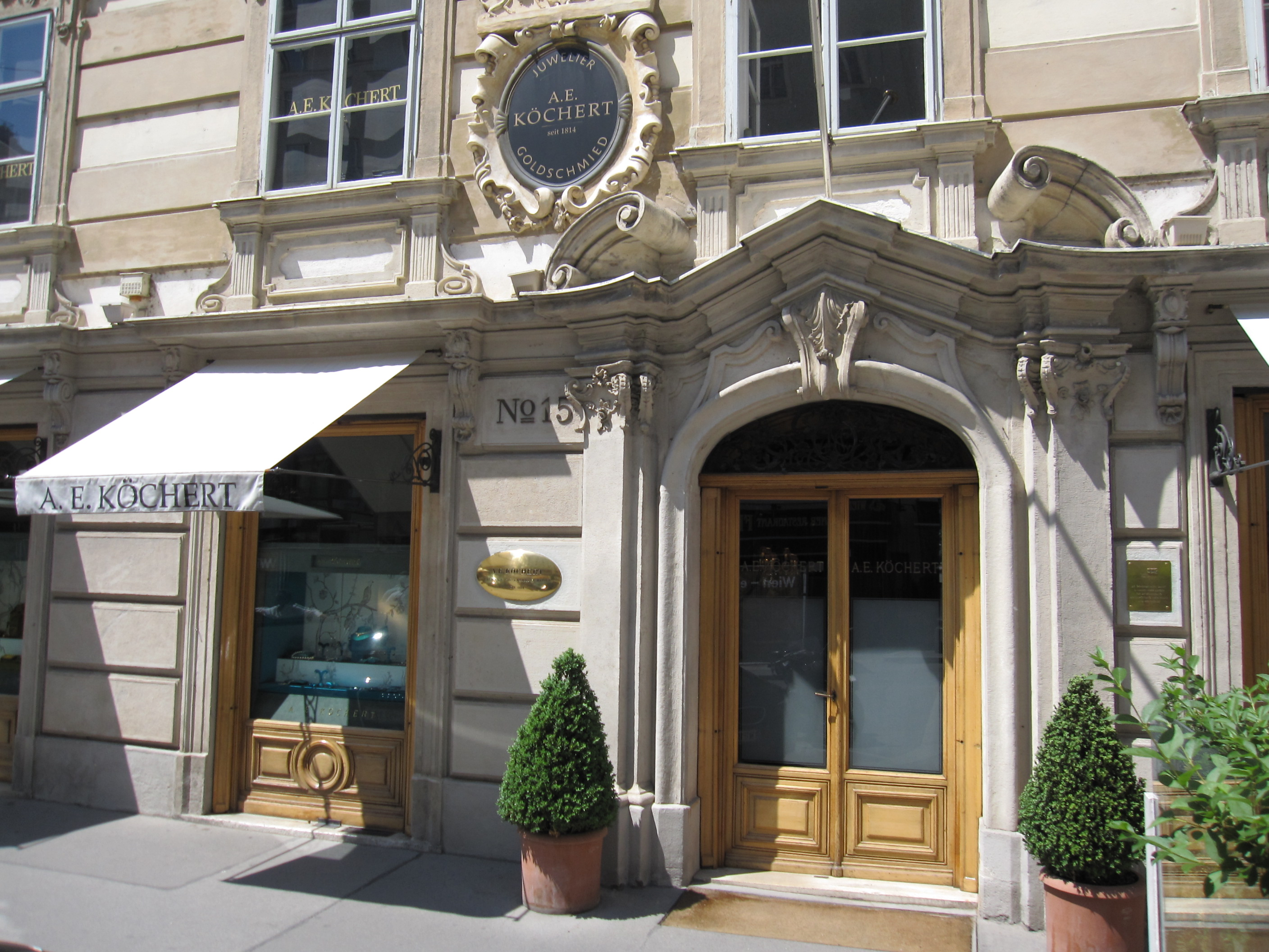 Jewelry store A. E. Koechert in Vienna's Neuer Markt.